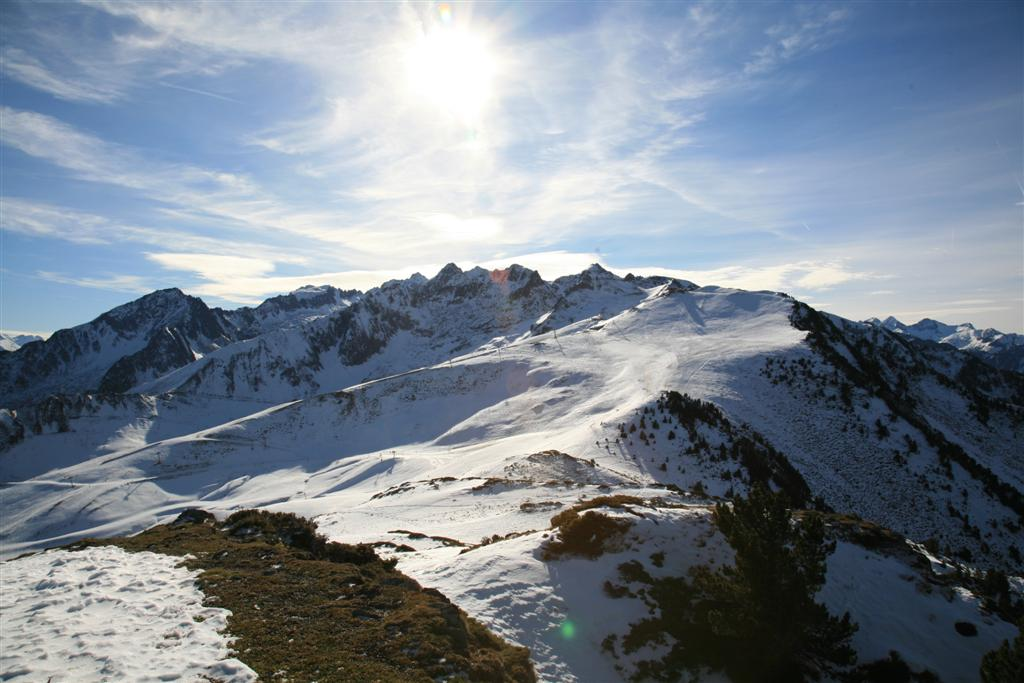 Luz Ardiden